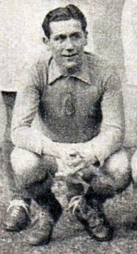 Alfred Aston (février 1942).